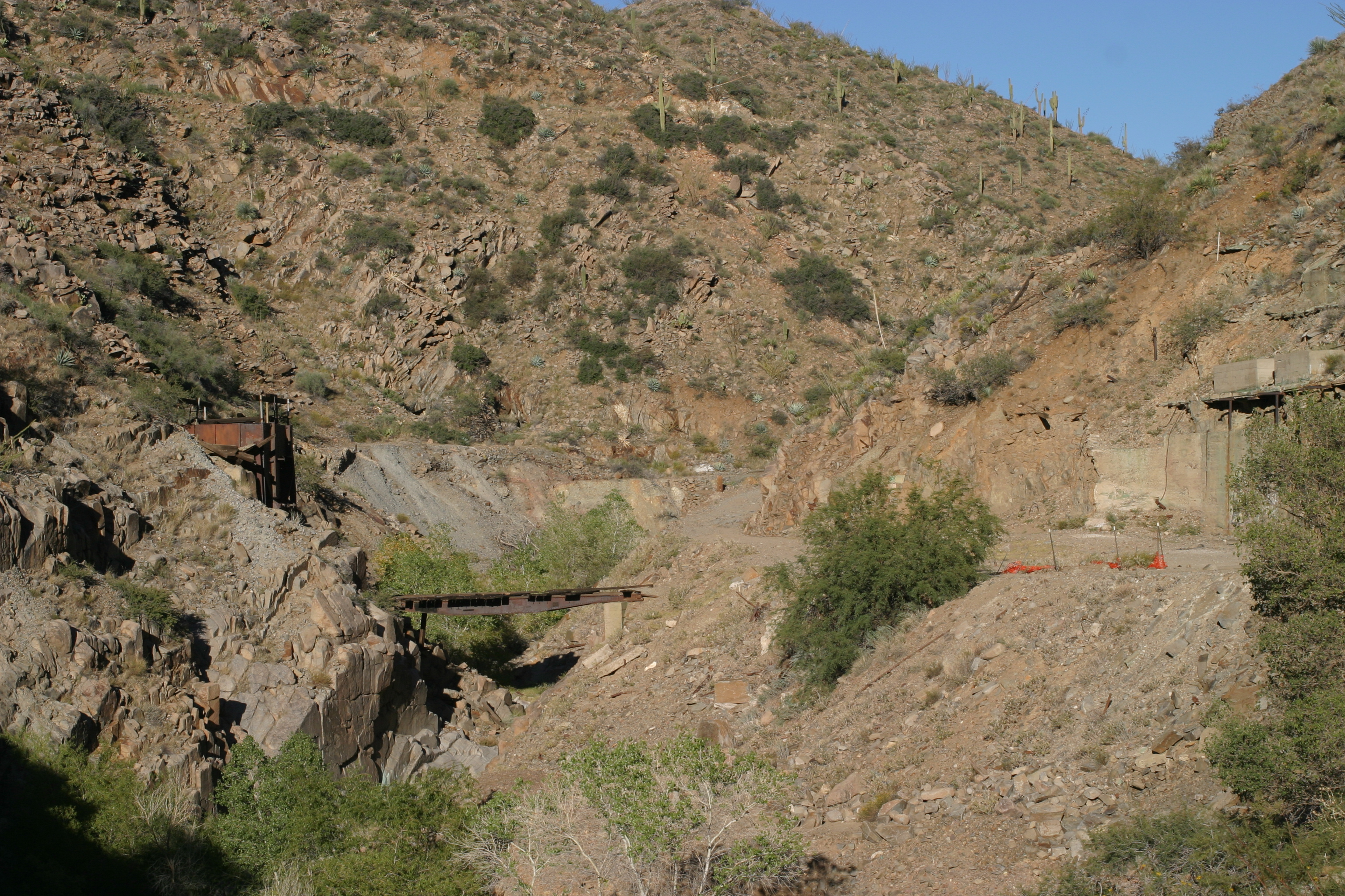 Copper Creek, AZ